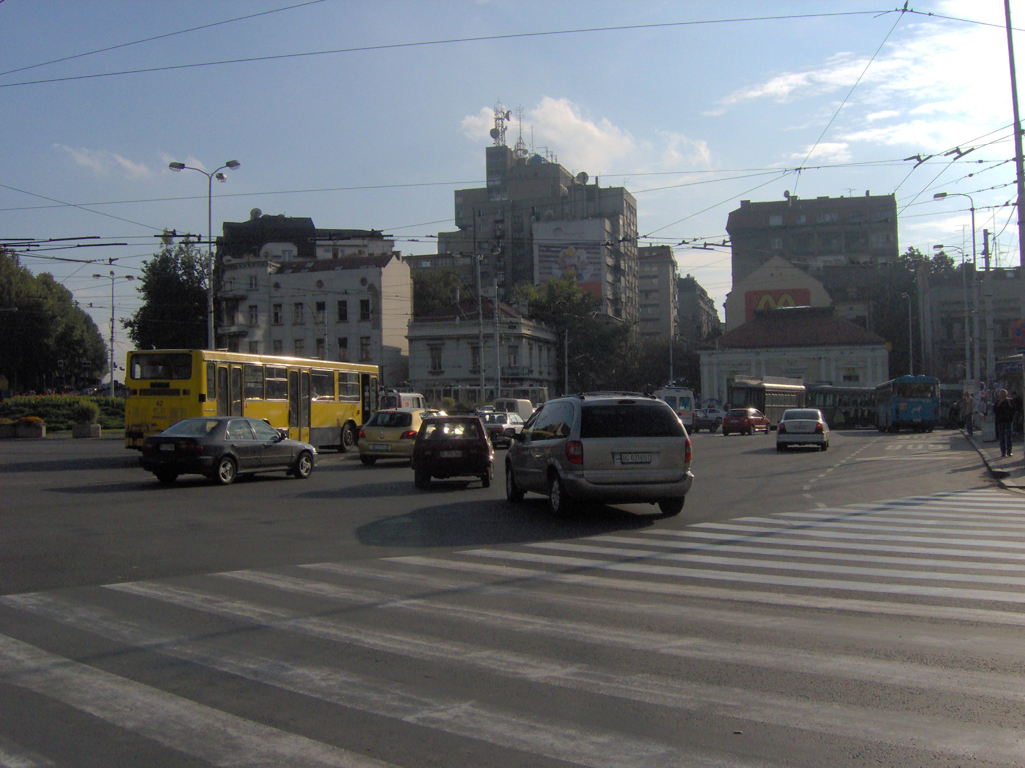 La place Slavija est une place située au centre de Belgrade